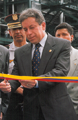 Corte de cinta de una central en Guayaquil. (Ecuador).